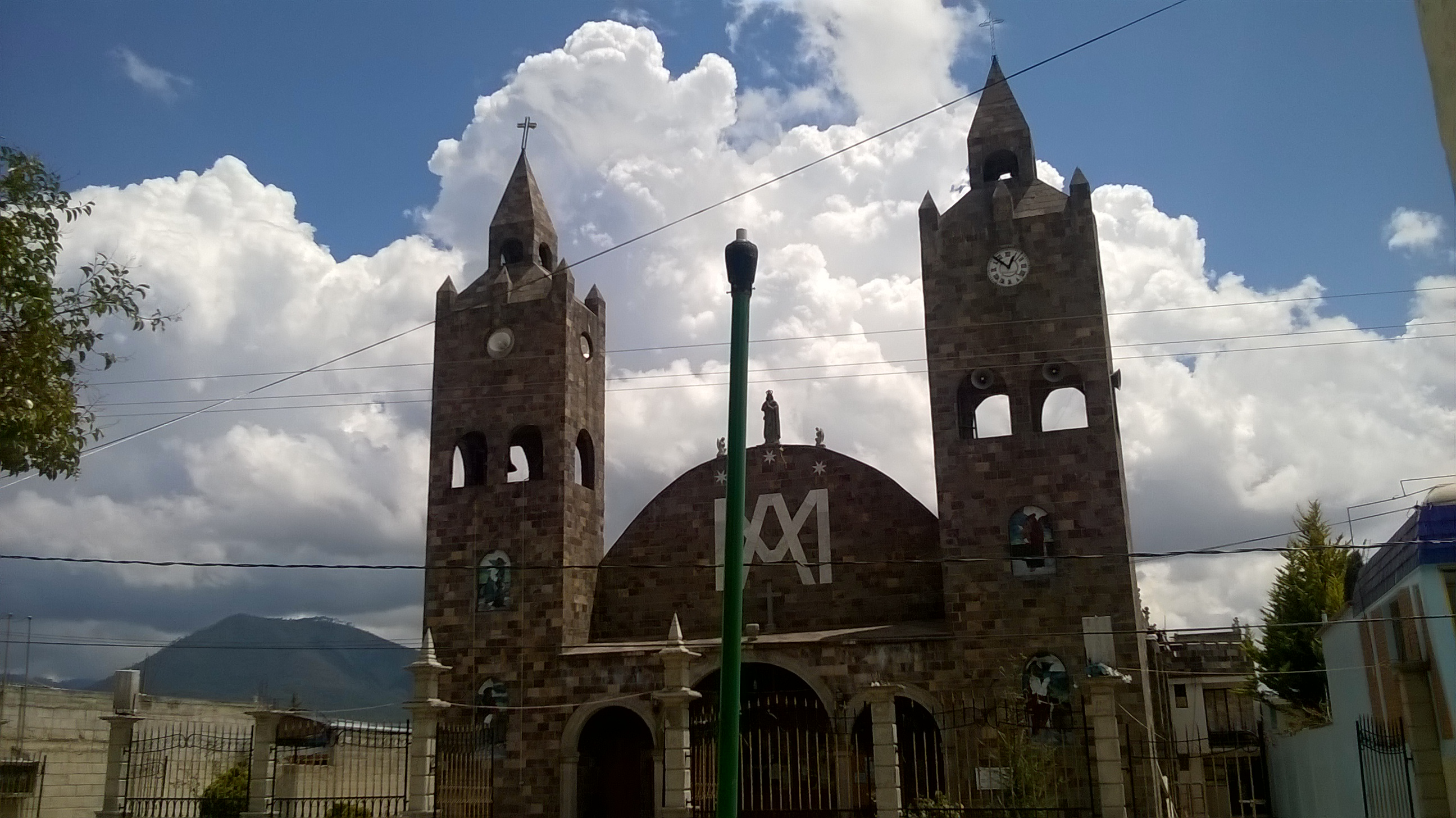 Iglesia de Lázaro Cárdenas, Tlaxcala